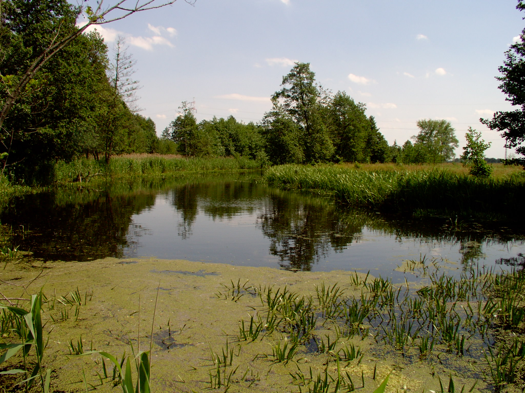 Drozdowo k. Łomży, starorzecze Narwica